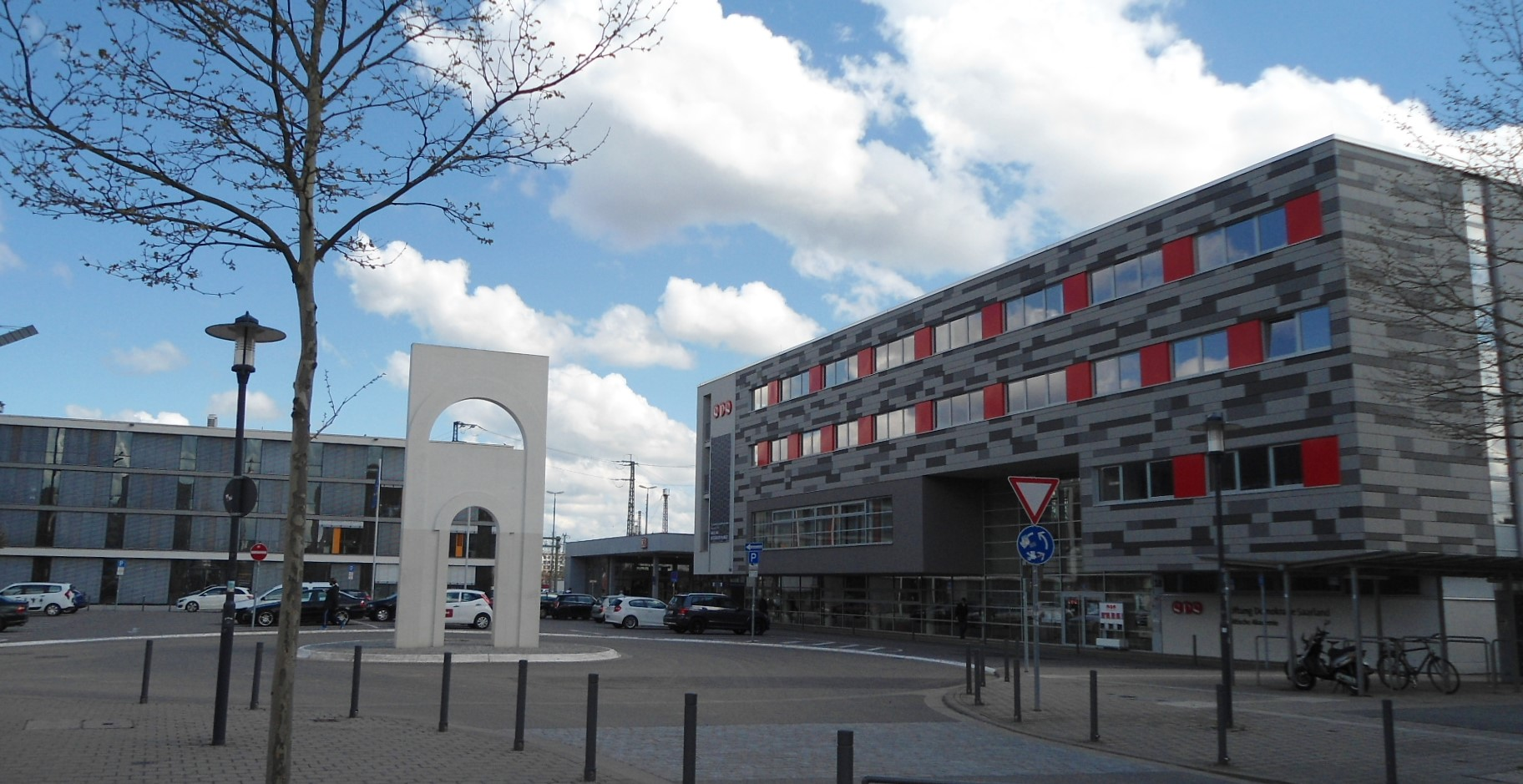 Quartier Eurobahnhof, Saarbrücken, Stiftung Demokratie (SDS)